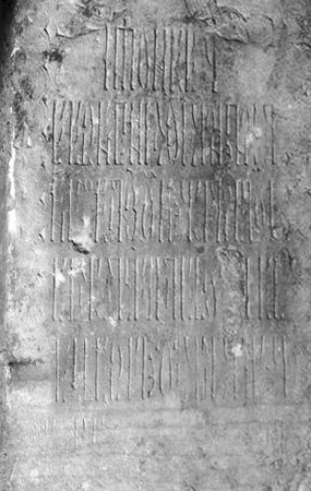 Ульяна Фёдоровна. Надгробие